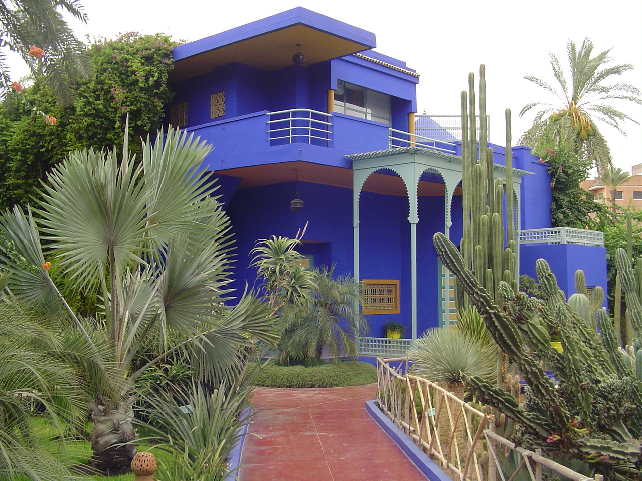 Blue villa in Majorelle garden